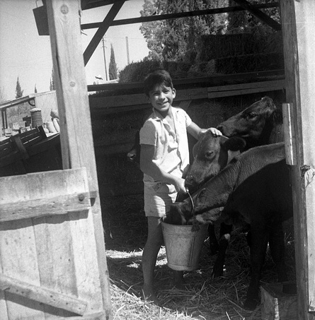 אביעזר יערי ברפת. צילום סטפן. מרחביה; 1942 - / מרחביה-קיבוץ